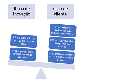 Nesta figuram, temos os dois grupos de riscos que as startups geralmente correm